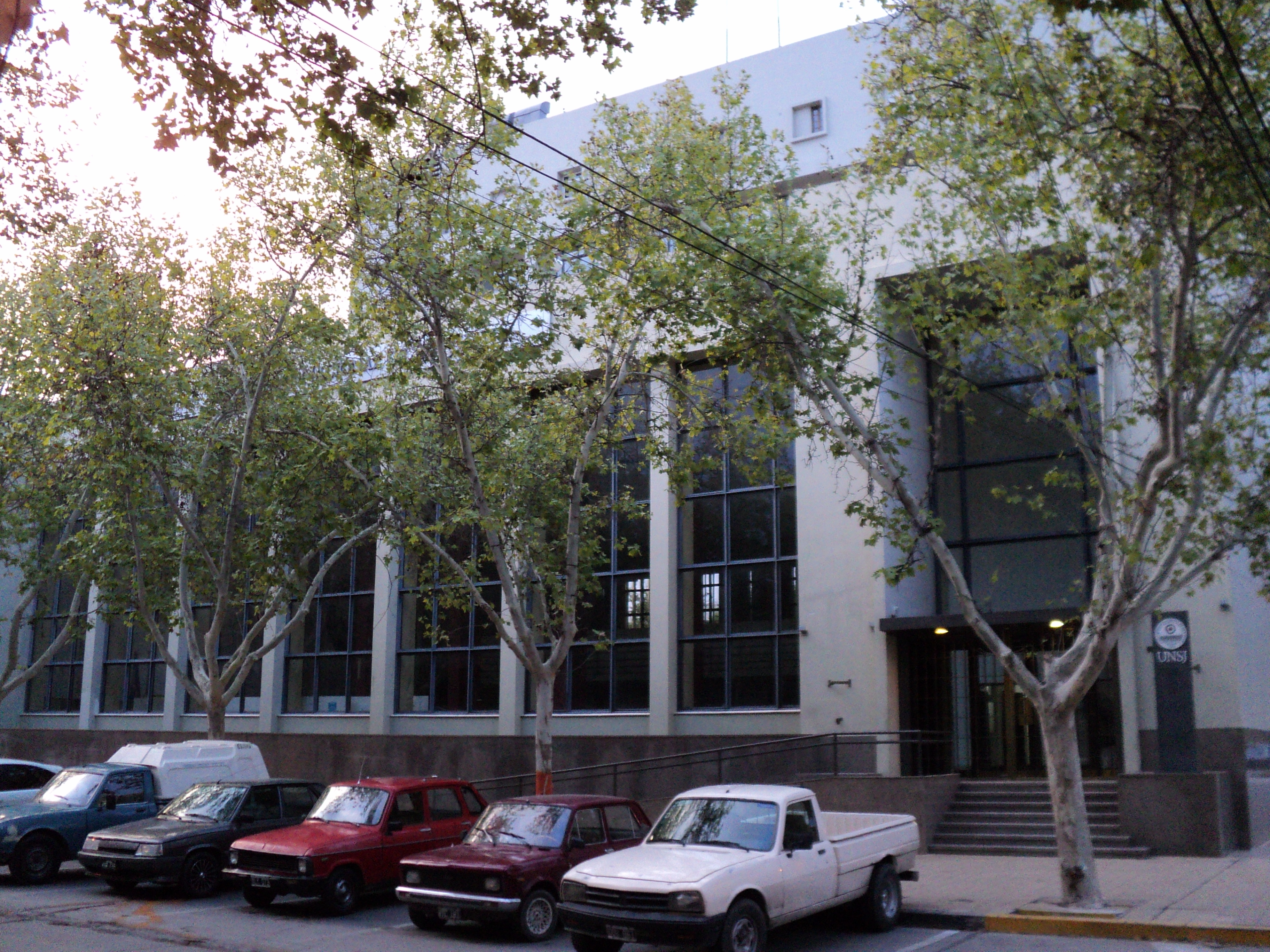 El rectorado de la UNSJ, atrás su torre de 7 pisos